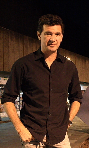 Julio Medem en su visita a la Cineteca Nacional, México, 2010.